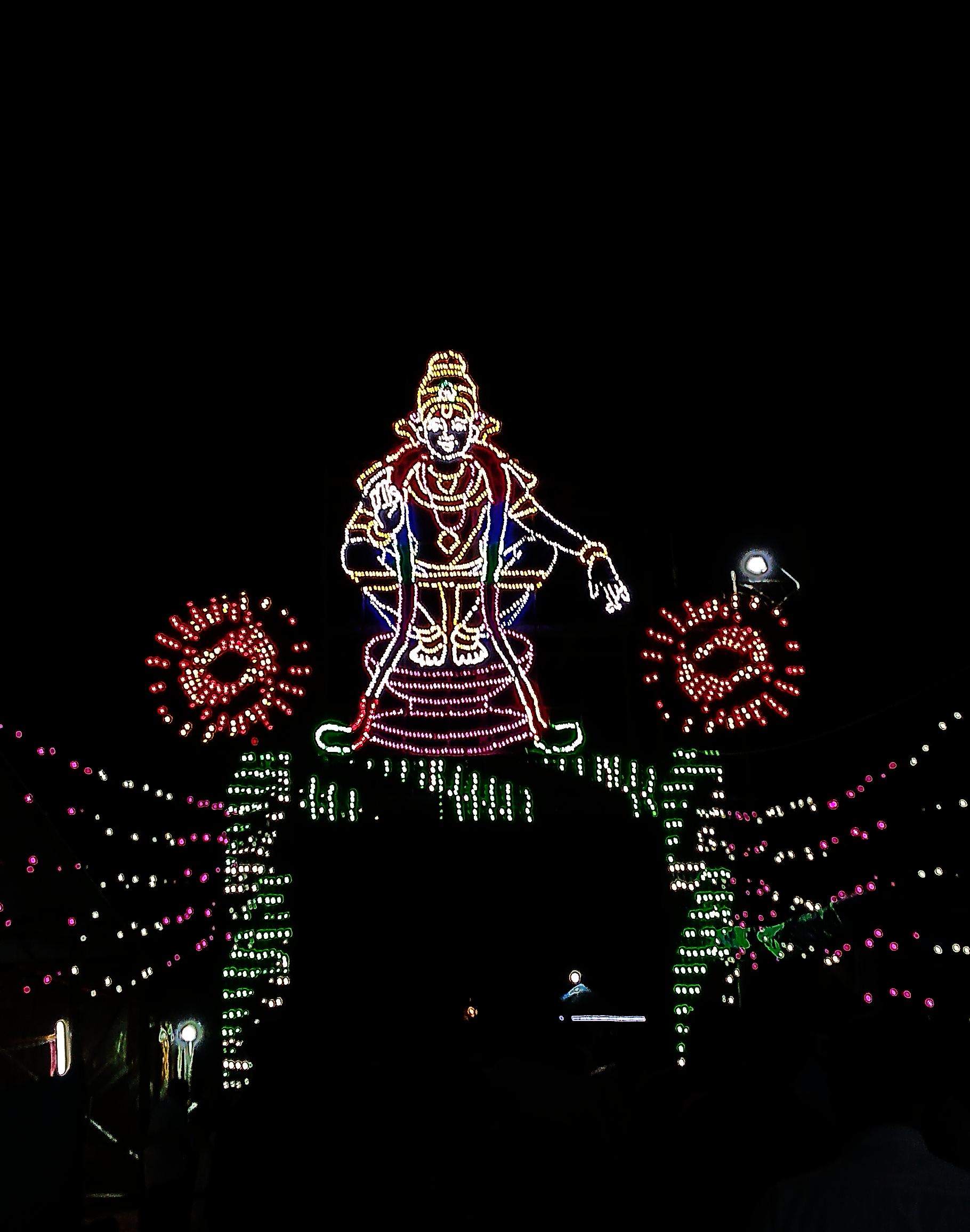 കേരളത്തിലെ ഒരു ആഘോഷമായ അയ്യപ്പൻ വിളക്കിൽ എൽ.ഇ.ഡി. ബൾബുകളുപയോഗിച്ച് അയ്യപ്പന്റെ ചിത്രം ഉണ്ടാക്കിയപ്പോൾ. കേരളത്തിലെ പാലക്കാട് ജില്ലയിൽ തൃത്താലയ്ക്കടുത്ത് അരിക്കാട് എന്ന് ഗ്രാമത്തിൽ വച്ച് നടന്ന അയ്യപ്പൻ വിളക്കിൽ നിന്ന്